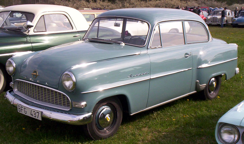 Opel Rekord 2-Door Sedan 1956